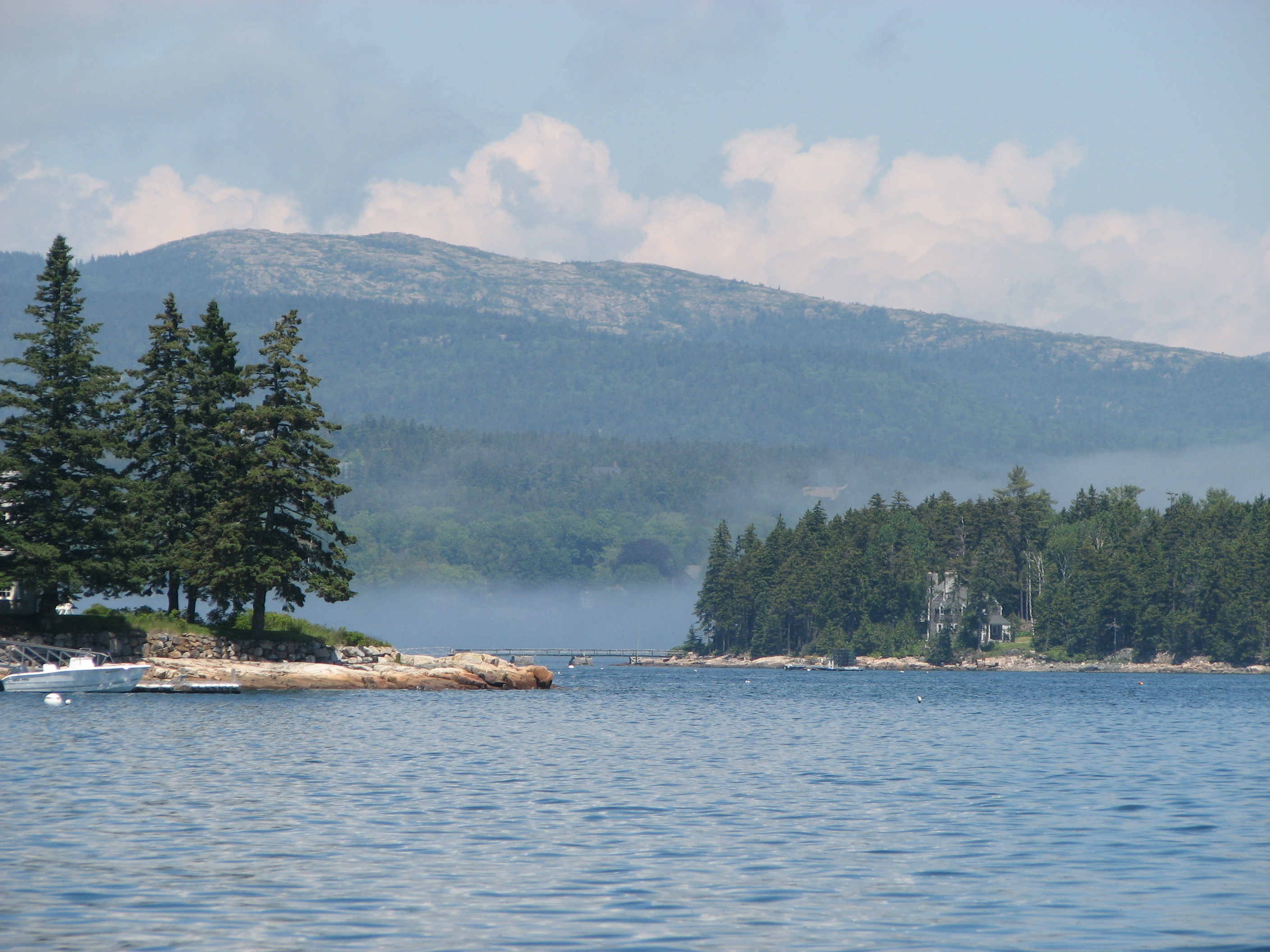 La côte de Mount Desert Island, près de Southwest Harbor, vue de la mer